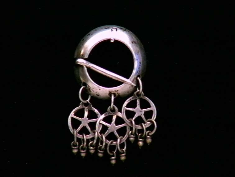 Bursring i sølv , innkjøpt i 1874 i Sunndal i Møre og Romsdal. Foto Anne-Lise Reinsfelt / Norsk Folkemuseum, NF.1993-0944.